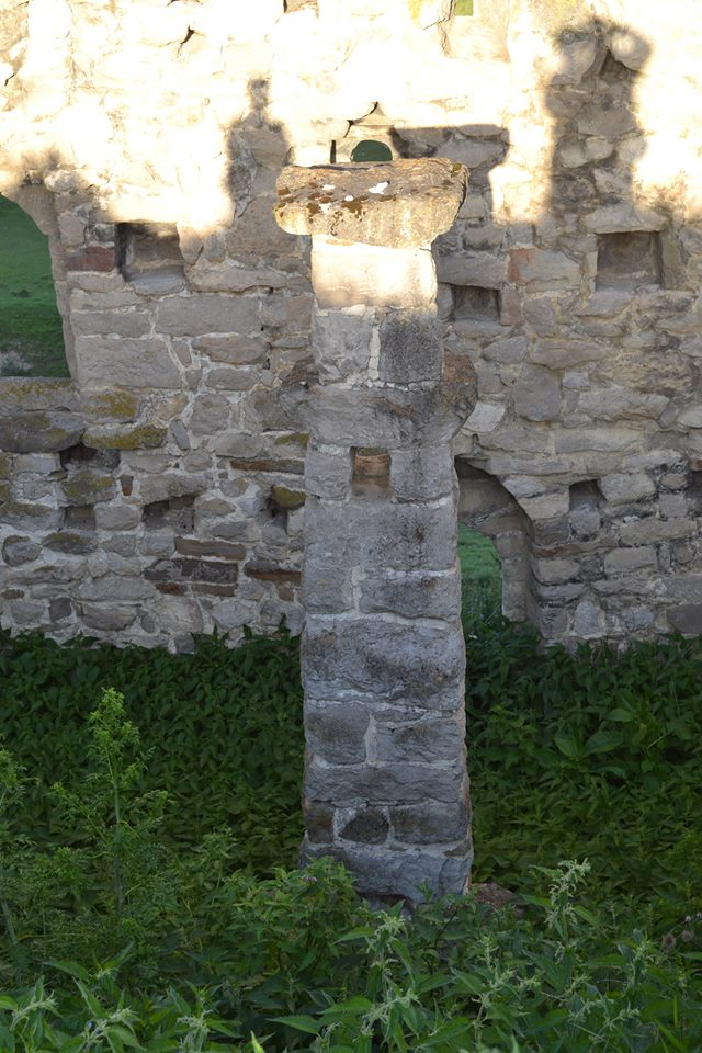 Центральный опорный столб ("ердабIоагIа") жилой башни в древнем поселении Фалхан (Ингушетия)